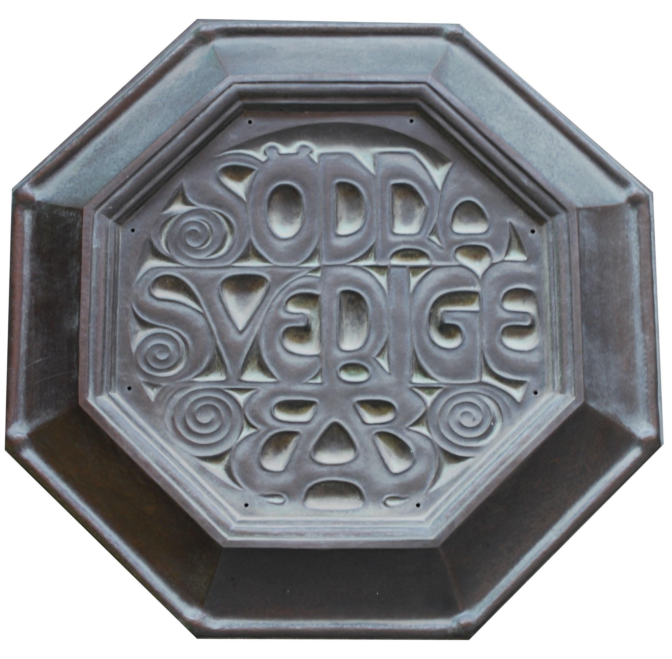 Arsenalsgatan 6